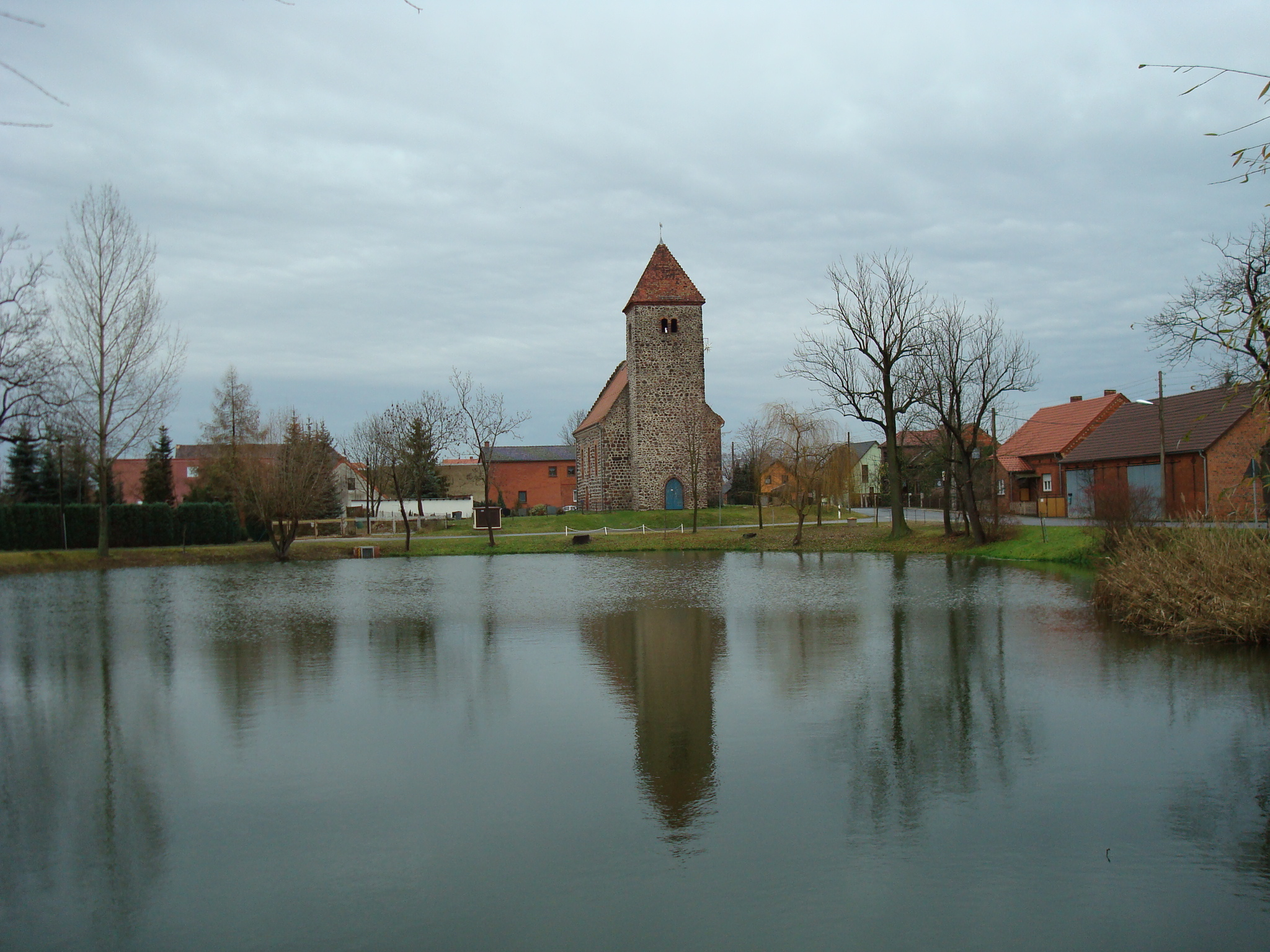 Gahlener Kirche mit Dorfteich